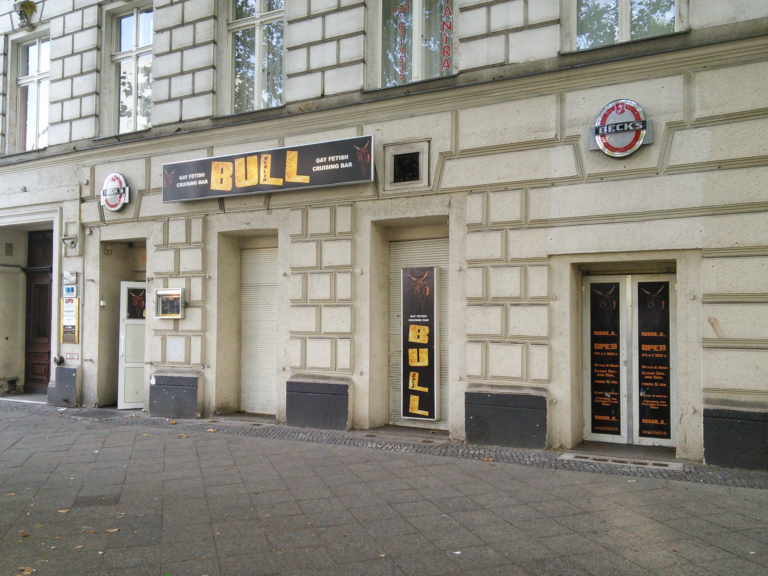 Das Bulls in Berlin